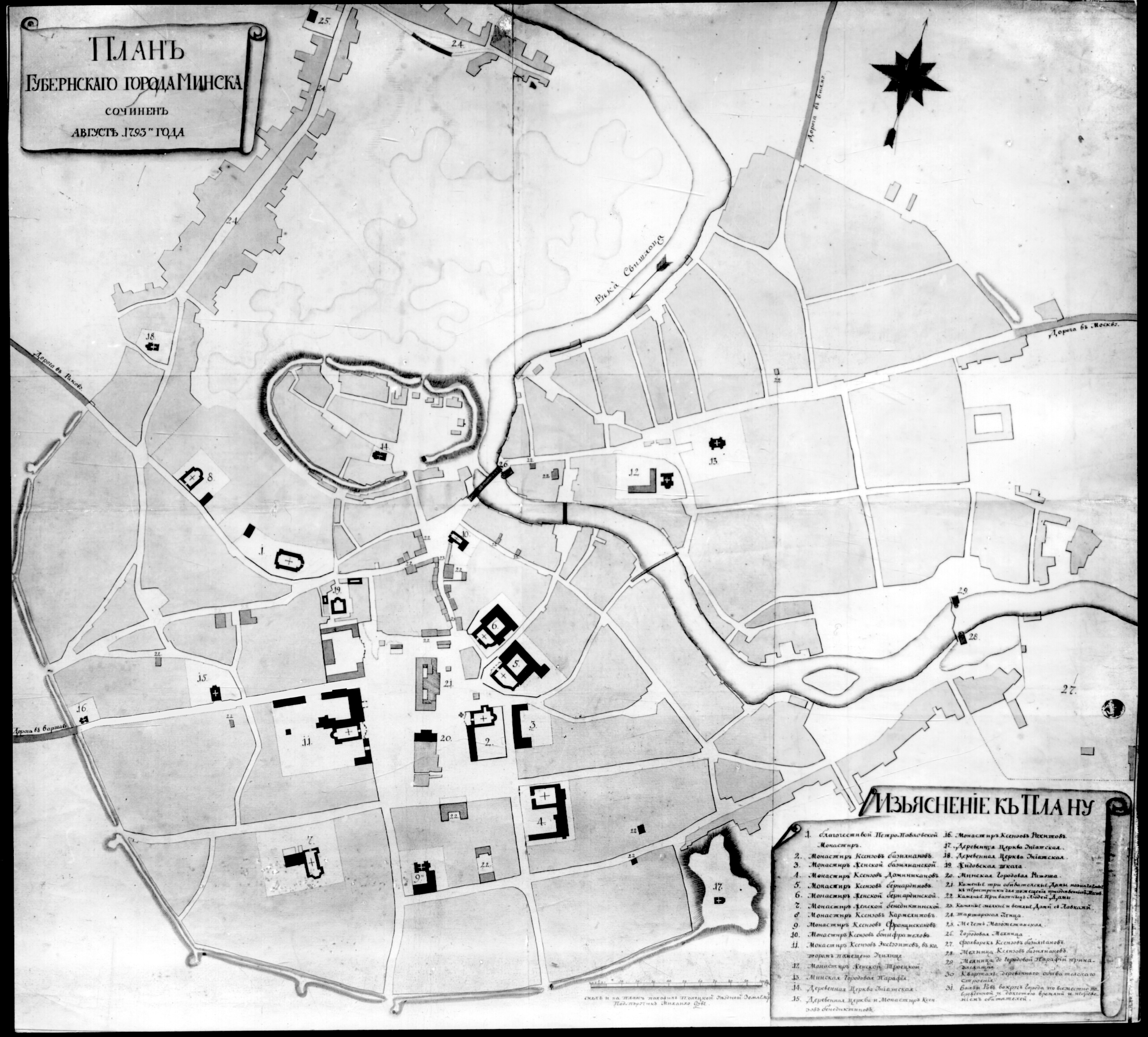 Мінск. План 1793 г. (РДВГА)Беларуская (тарашкевіца): Менск (Miensk). Плян места